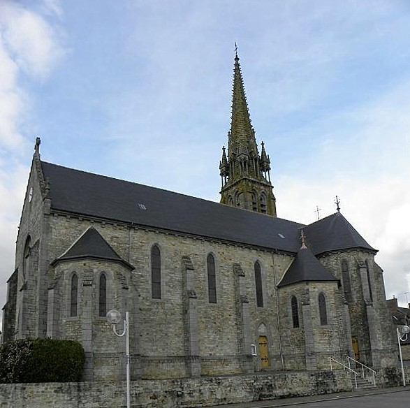 Église Notre-Dame de Pocé-les-Bois (Ille-et-Vilaine, Bretagne, France).